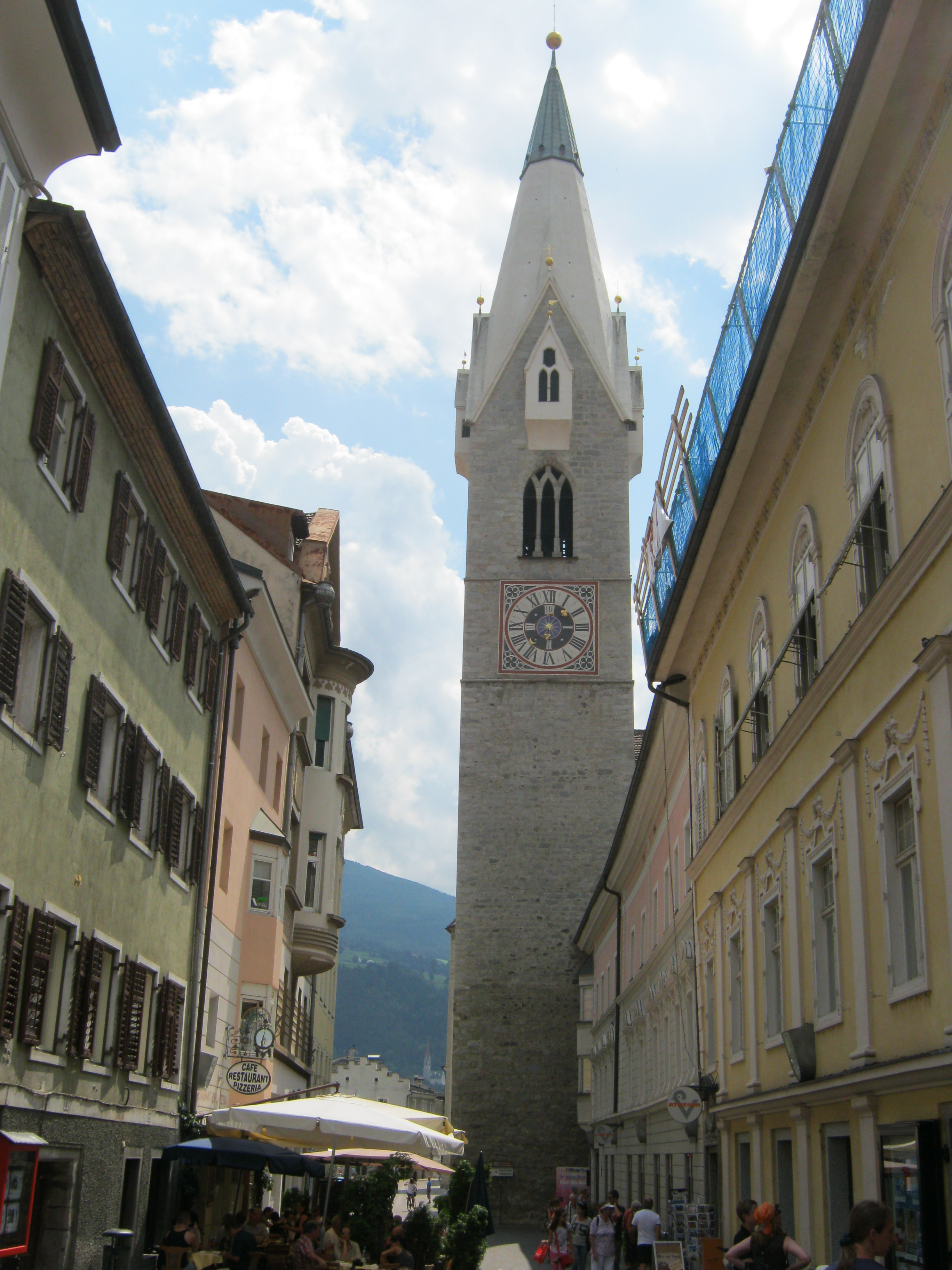 Der Weiße Turm in Brixen, im Jahre 1459 fertiggestellt und seitdem nicht wesentlich verändert.